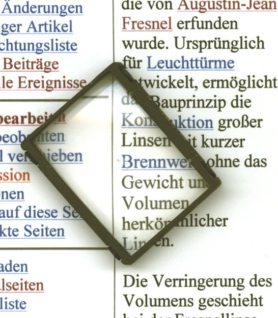 Matte Seite der selben Scheibe Titel: Fresnellinse als Mattscheibe einer Spiegelreflexkamera (Original text: Standard-Mattscheibe (Typ A mit Schnittbildindikator) der Nikon F auf einem ausgedruckten Wikipedia-Artikel) (EN:) Focusing screen Datum: 13.3.2004 Fotograf: Arne List Aufnahmetechnik: Die Mattscheibe aus der Nikon ausgebaut und auf einen Flachbettscanner gelegt. Auf die matte Seite der Mattscheibe wurde ein ausgedruckter Wikipedia-Artikel gelegt und das Ganze dann mit 600*600 dpi gescannt. In der EBV wurden Helligkeit und Kontrast des Papiers so gesteigert, damit es nicht auffällt, dass es einige Millimeter über der Glasfläche des Scanners (und dadurch "schattiger") war. Es existiert auch eine Version mit der matten Seite nach vorne (siehe Thumb).